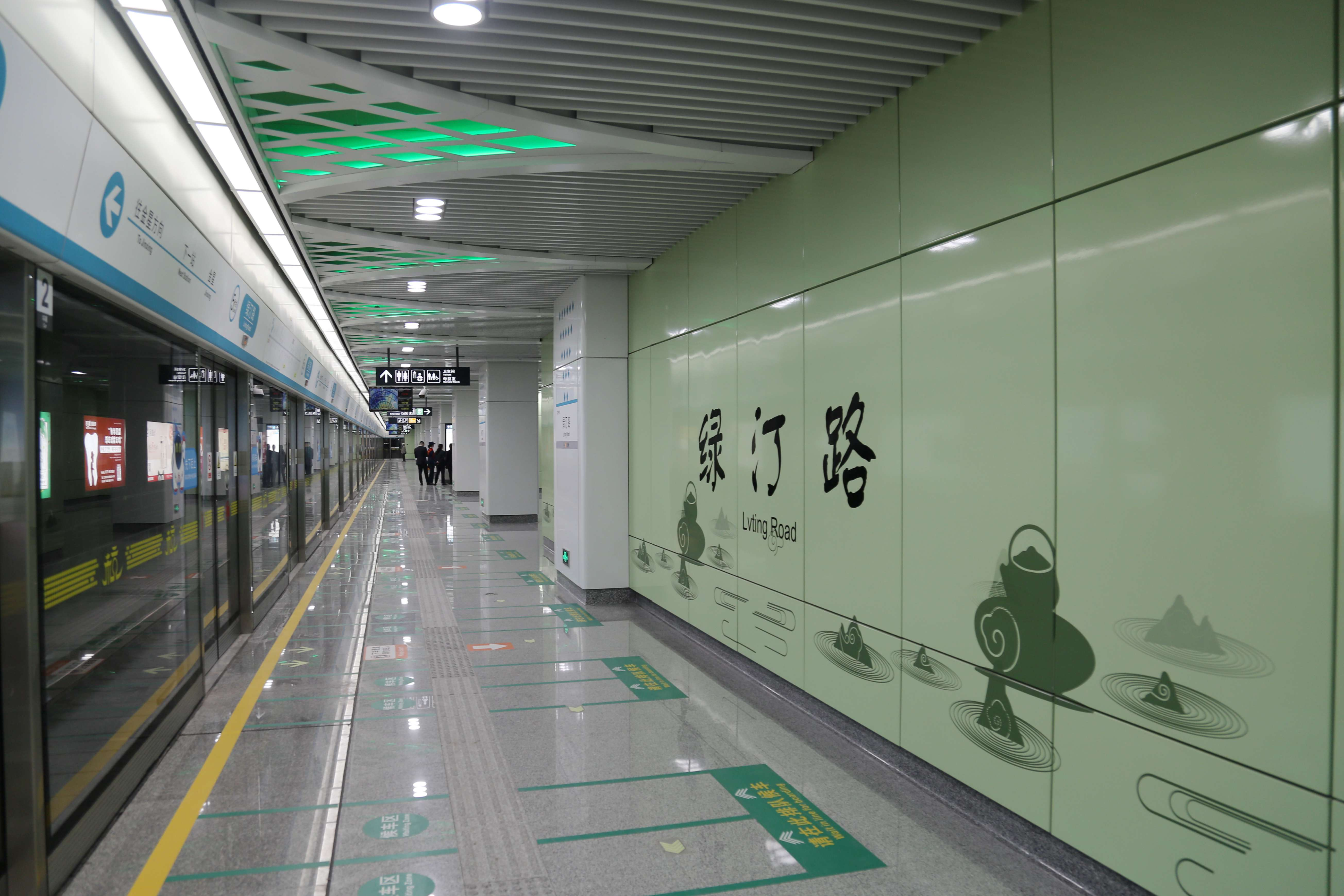 绿汀路5号线站台